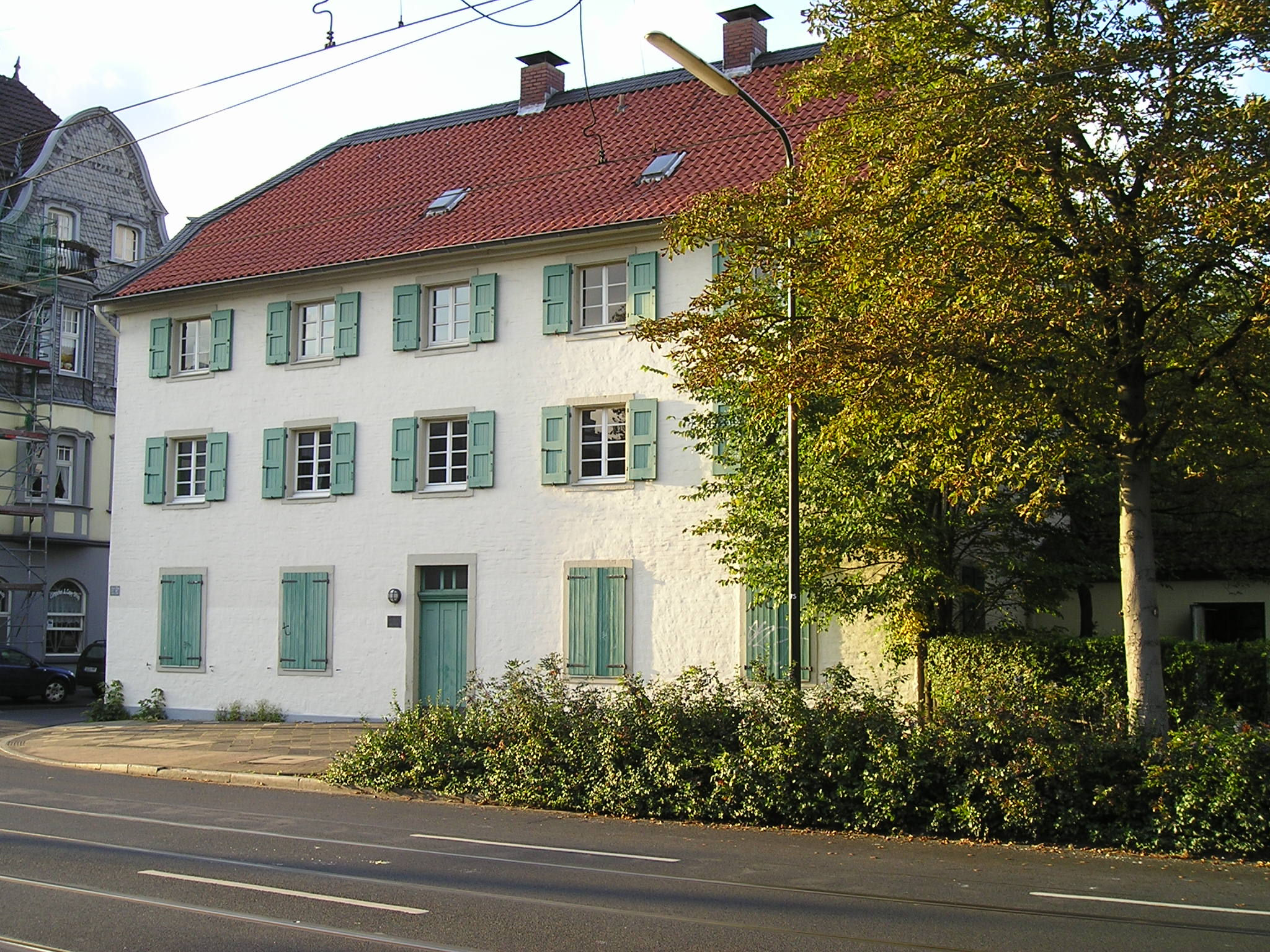 Die alte Posthalterei (um 1800 errichtet), "Haus Spilles", heute Jugendkulturzentrum, Benrather Schloßallee 93, Düsseldorf-Benrath